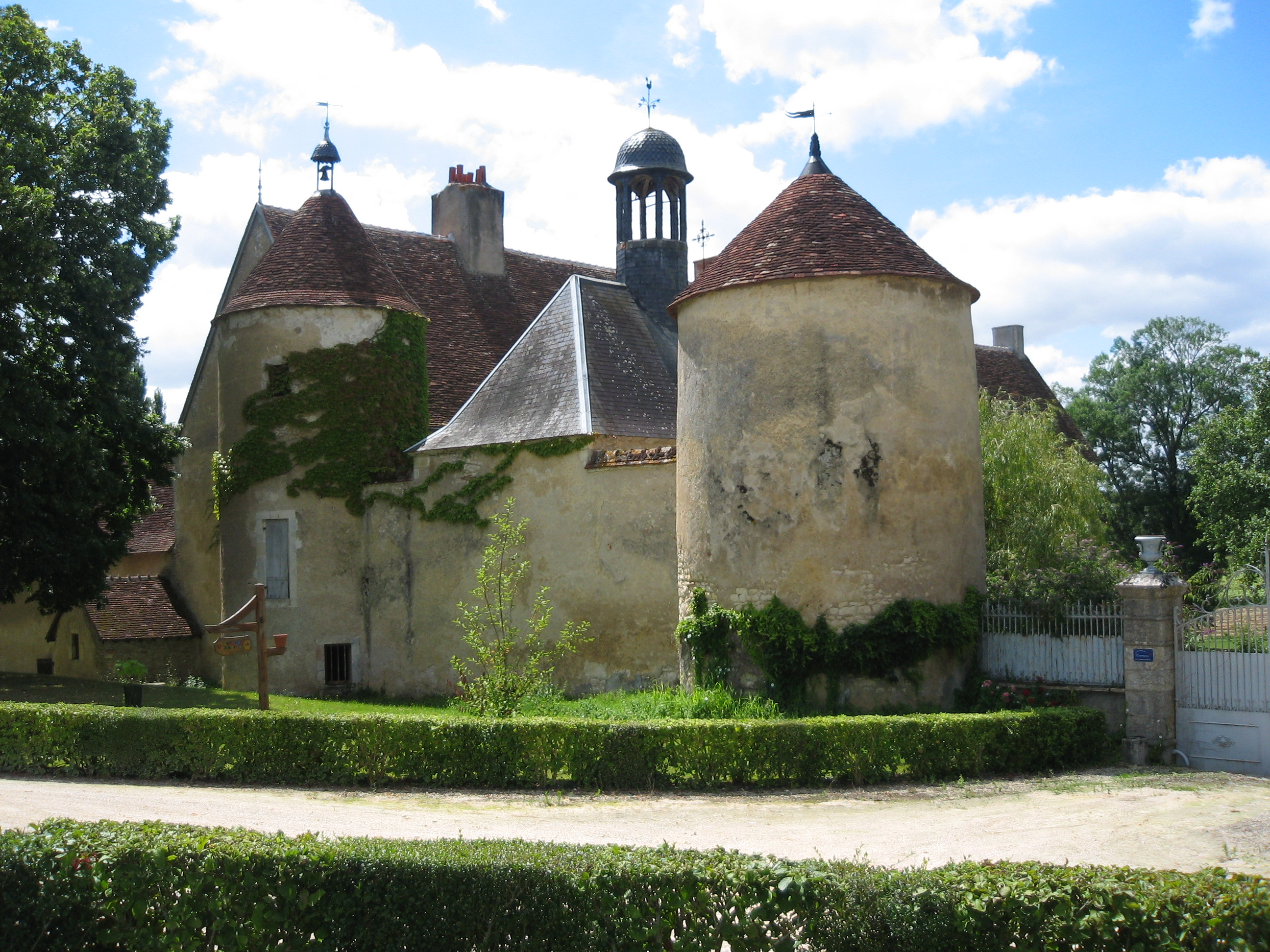 Vestiges d'un ancien château fort du XVème, au sud de Villeneuve sur Cher -18-.